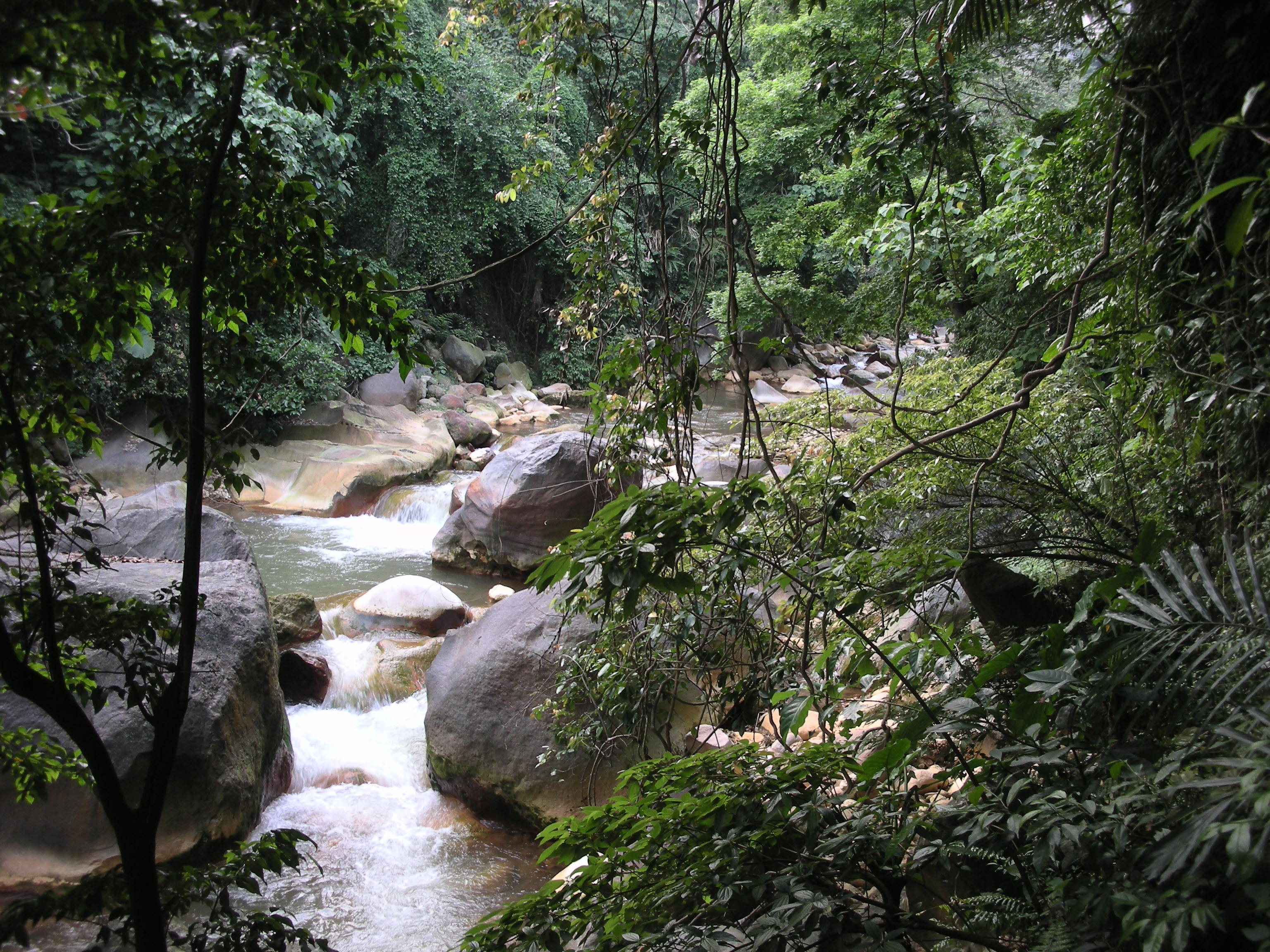 天母公園Tianmu Park